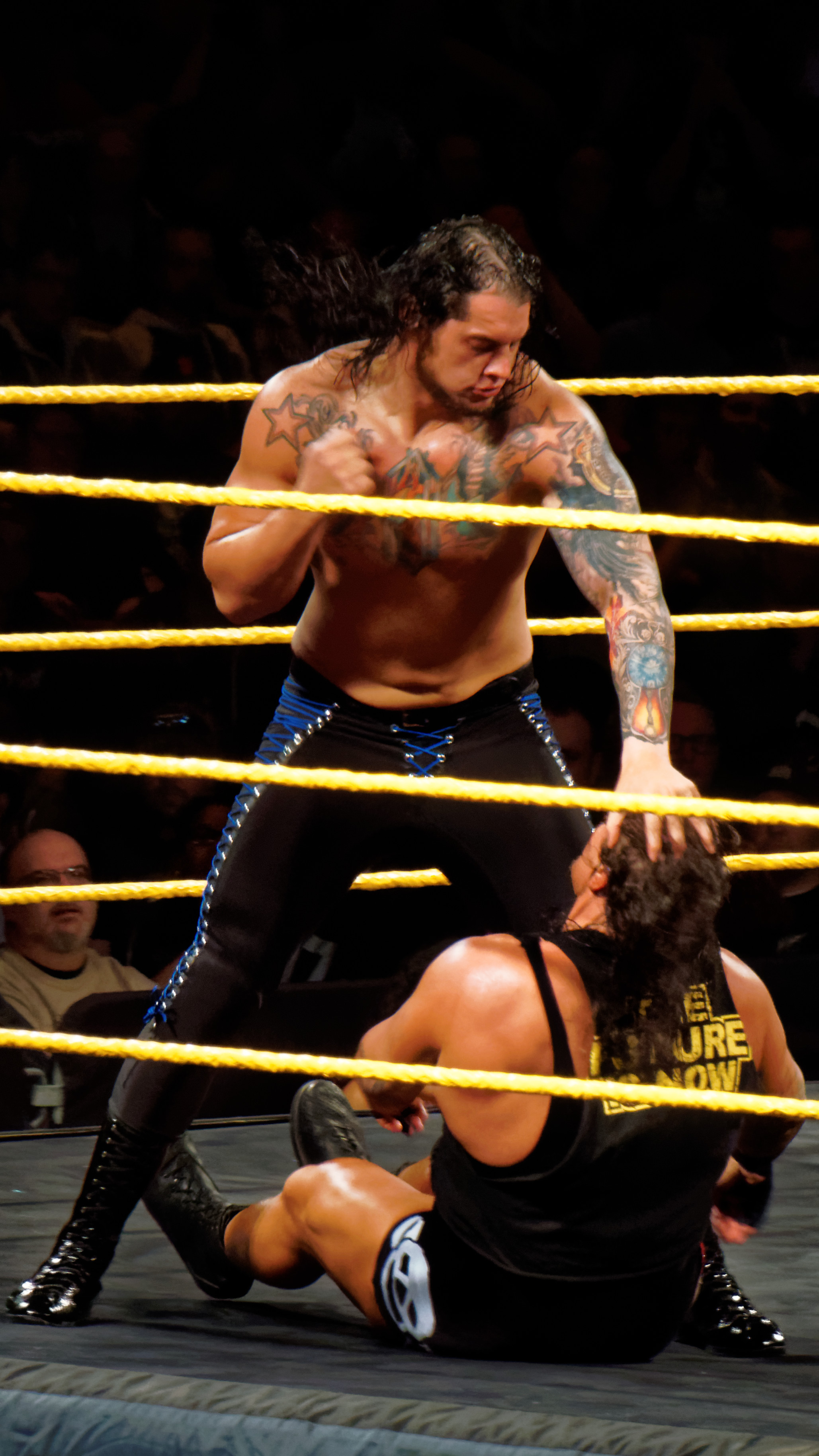 2015-03-27_23-16-08_ILCE-6000_3565_DxO